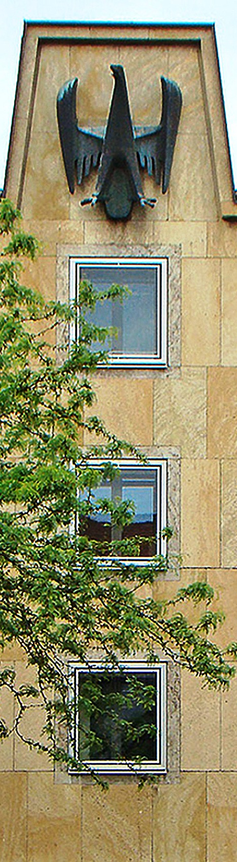 Fassade des Südflügels vom Rathaus-Anbau in Heilbronn